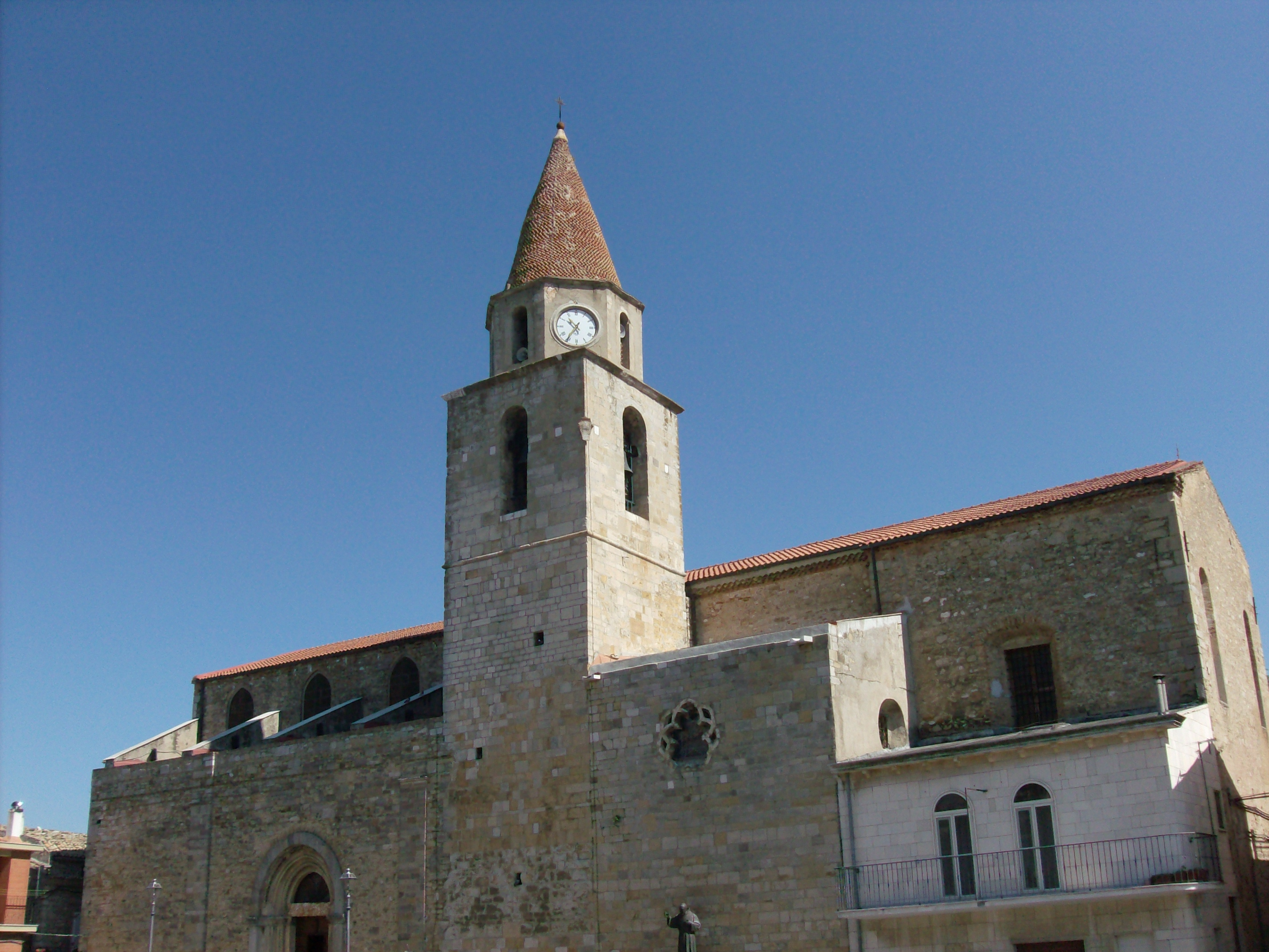 Chiesa matrice Castelnuovo della Daunia edificata alla fine del XII secolo per volere di Innocenzo III